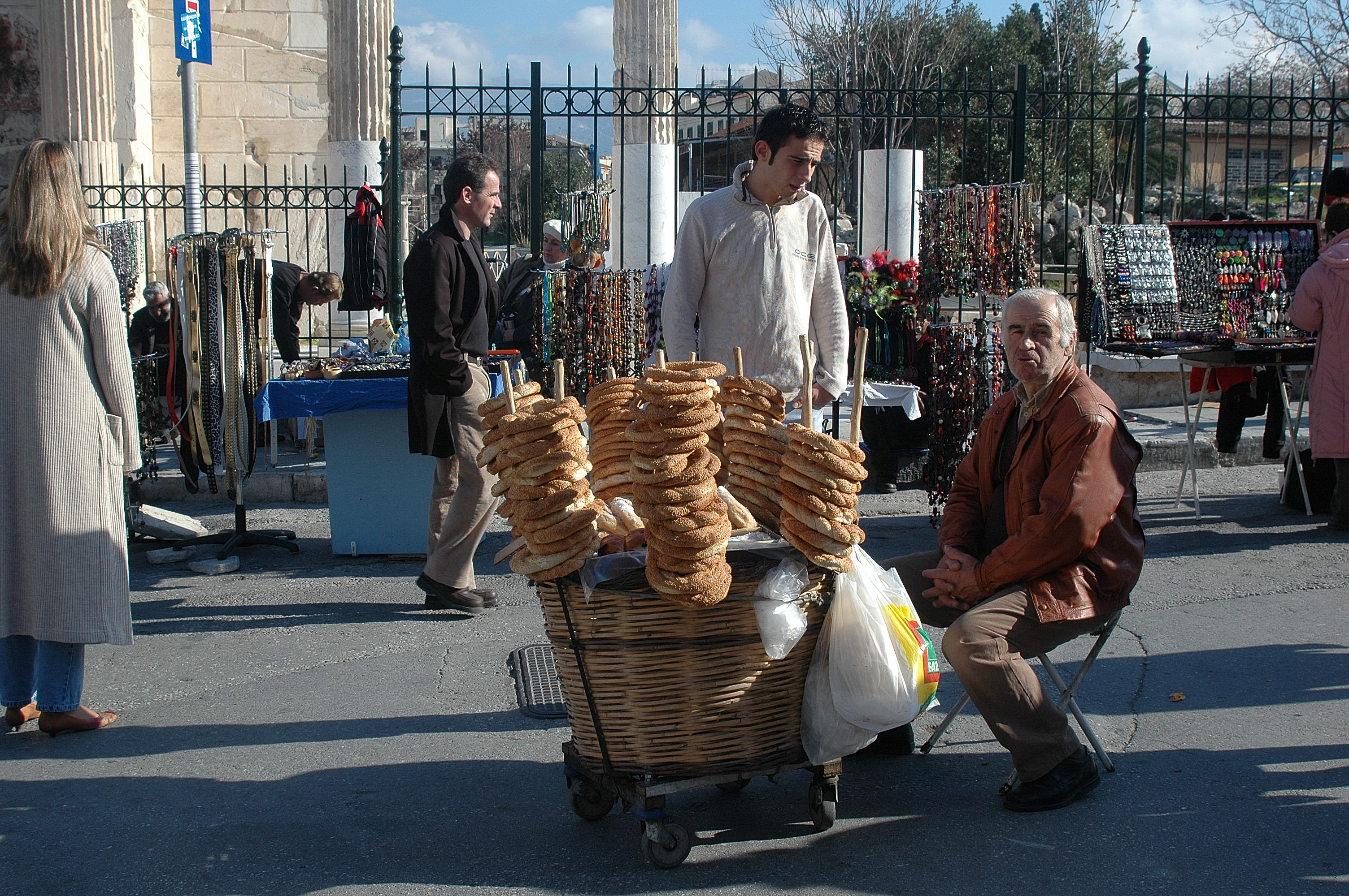 Athènes Monastiraki. Photo prise par Harrieta171 le 21/01/06